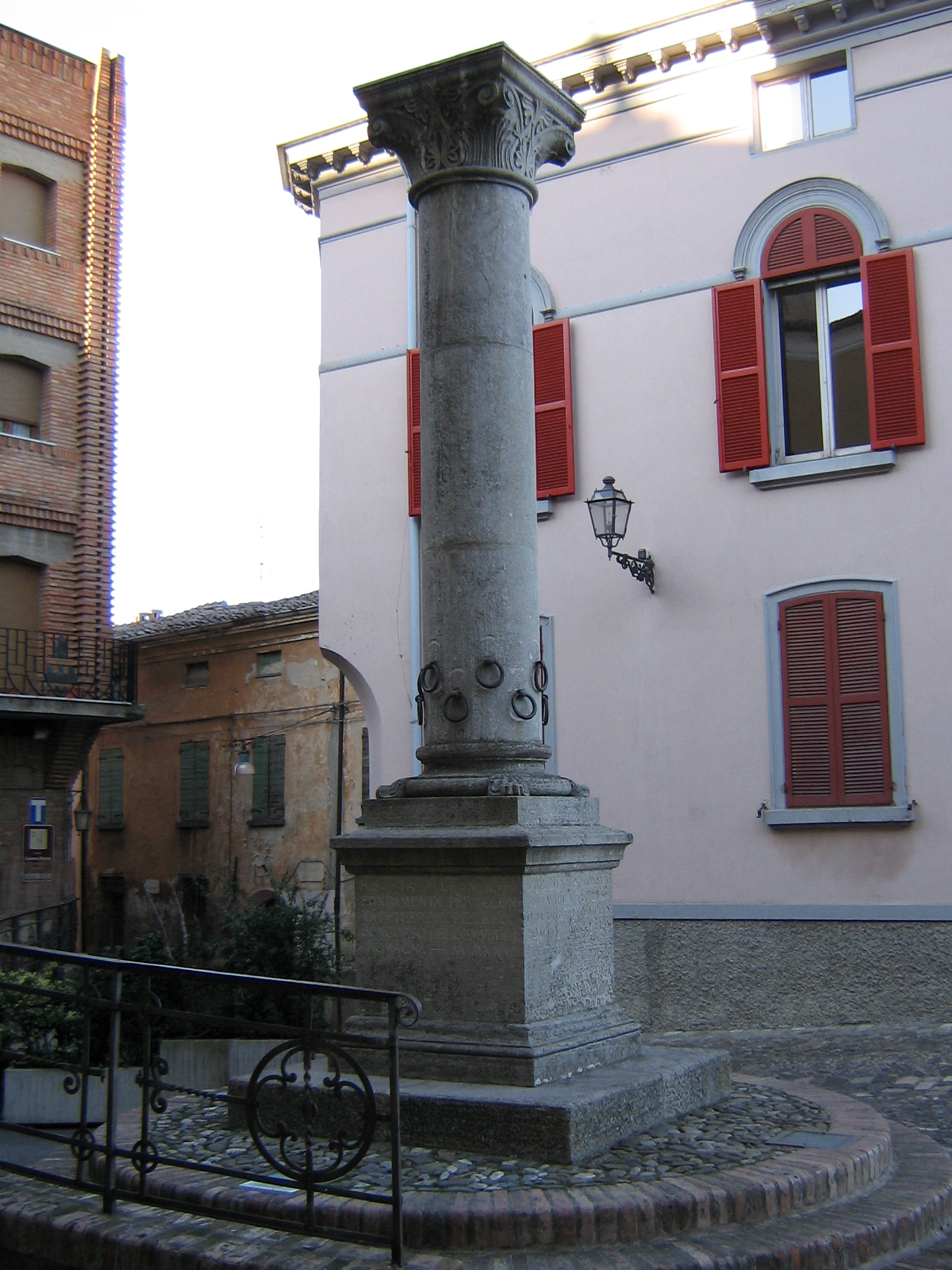 Colonna dell'ospitalità, Bertinoro (FC), Italy.